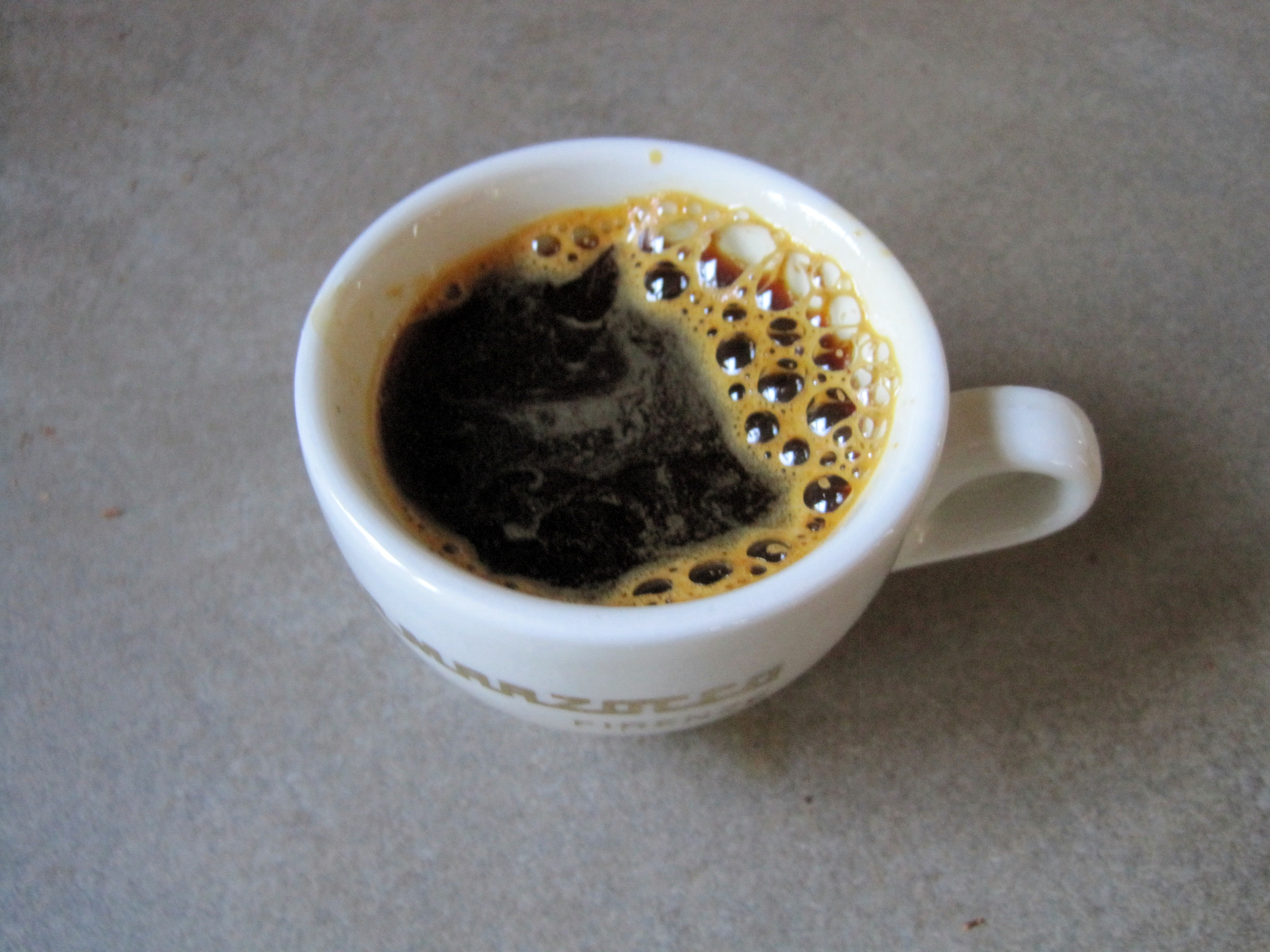 Red espresso.